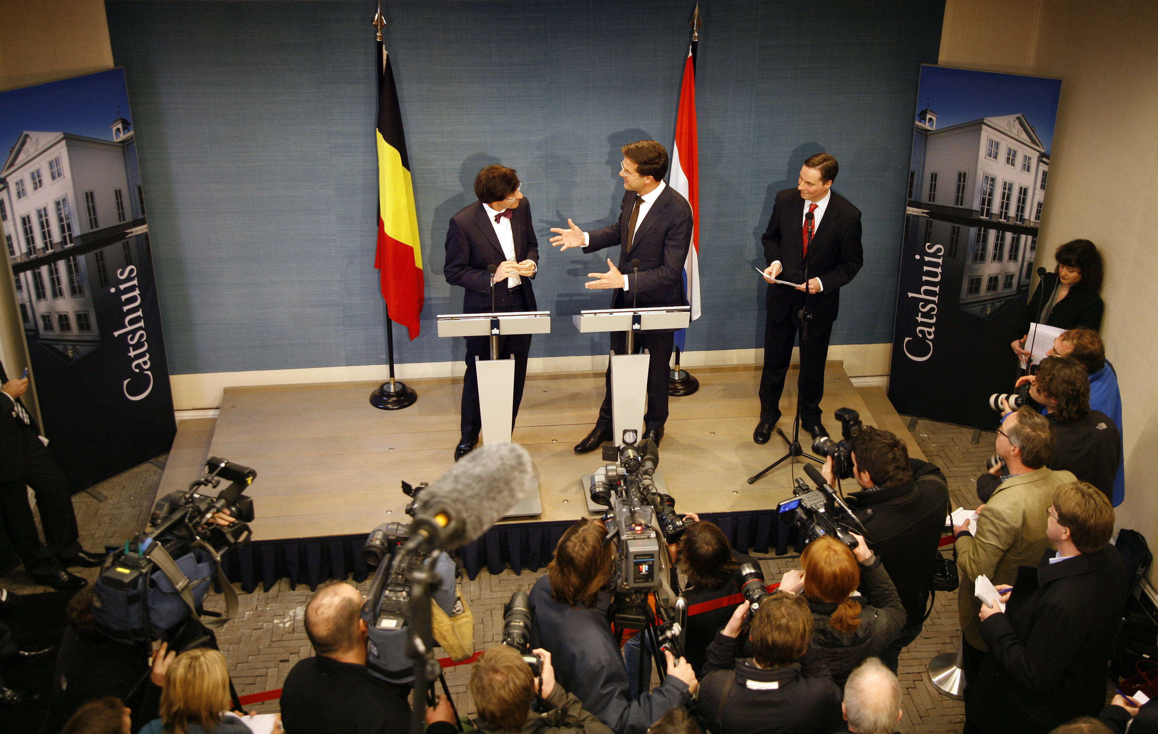 Minister-president Rutte en premier Di Rupo staan na afloop van hun ontmoeting de pers te woord in het koetshuis van het Catshuis. Tijdens de ontmoeting is onder meer gesproken over de gezamenlijke aanpak van de Europese schuldencrisis en bilaterale samenwerking tussen Nederland en België.